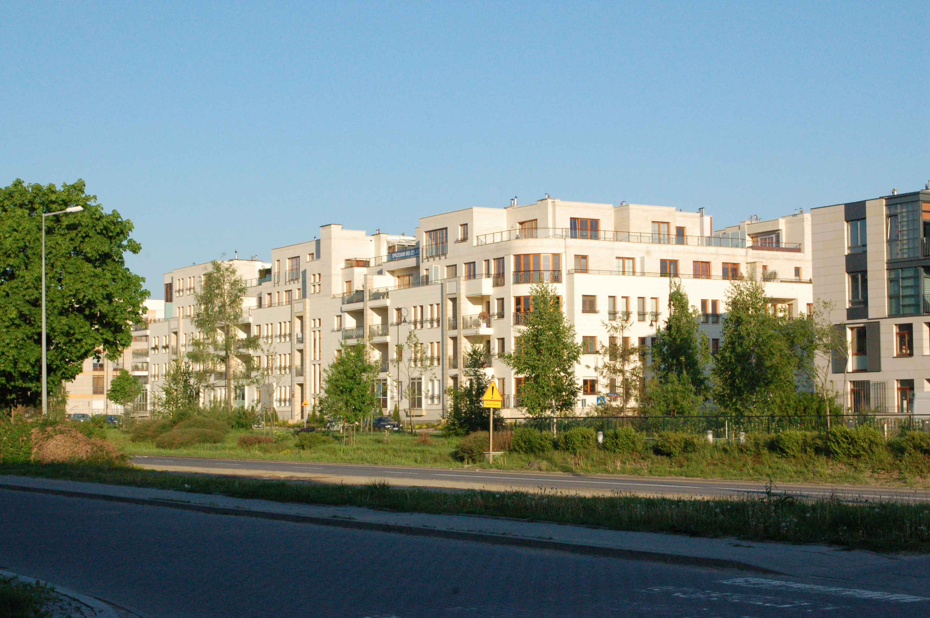 Miasteczko Wilanow, Warschau